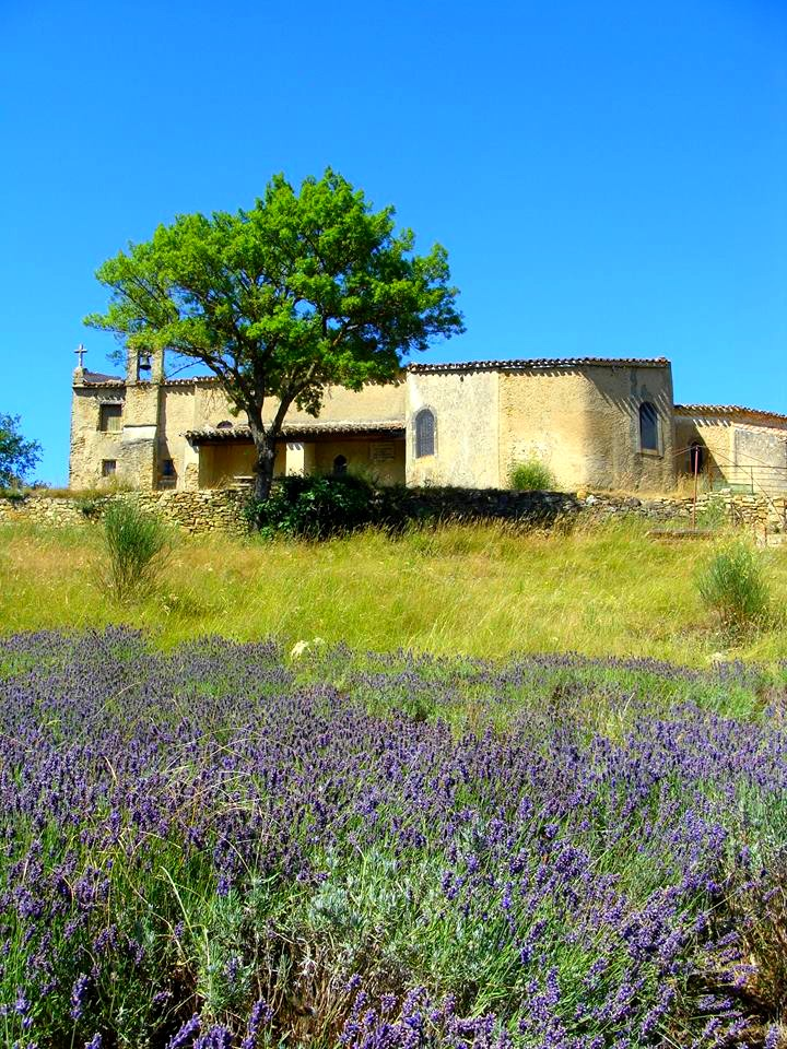 Le Calvaire dominant le village de Chalabre (Aude, France).